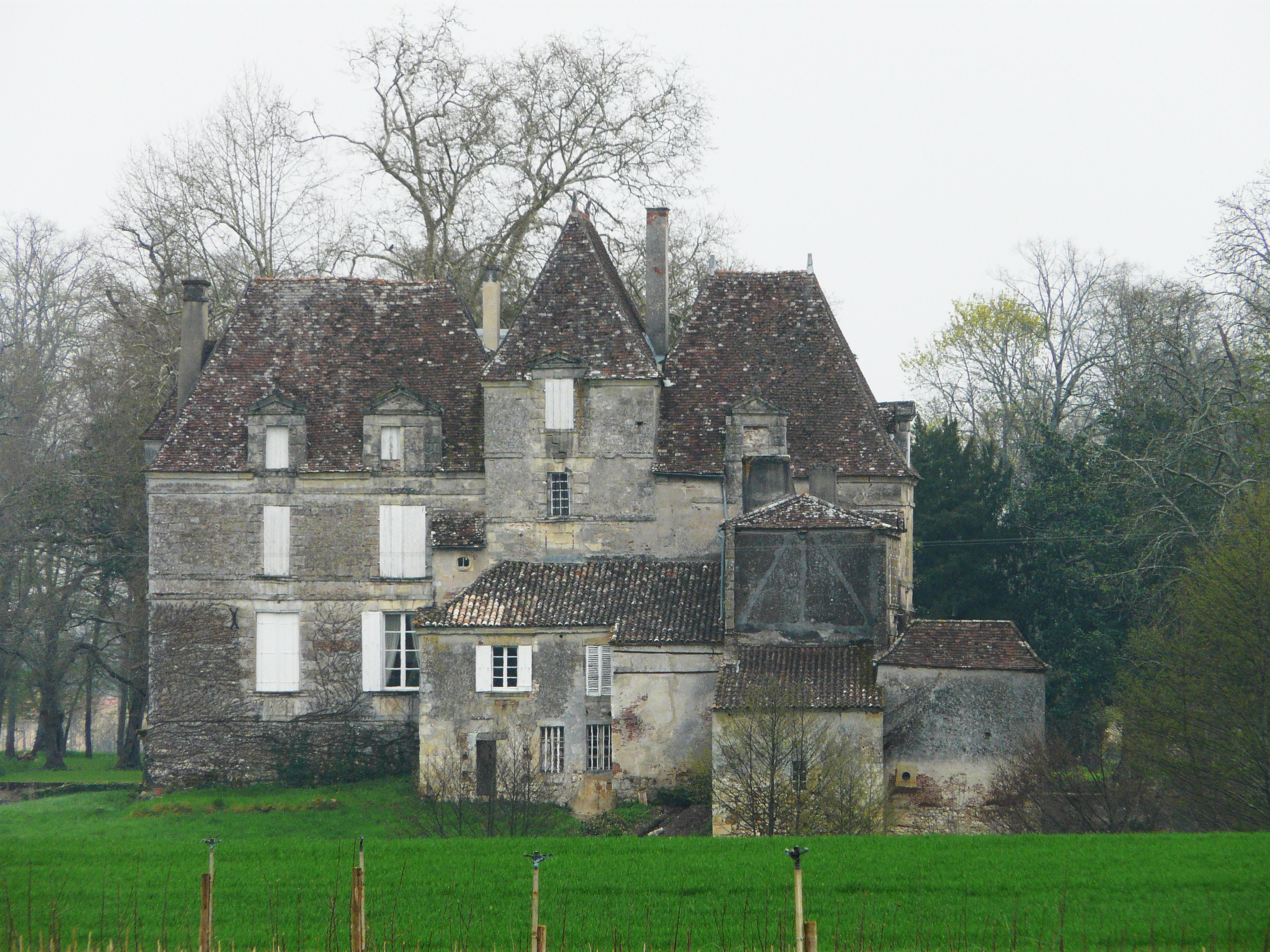 Le château de Saint-Martin vu depuis le nord-ouest, Lamonzie-Saint-Martin, Dordogne, France.